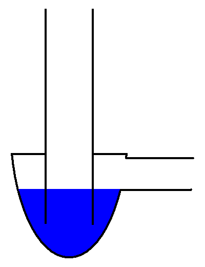 Funktionsprinzip eines Flaschensiphon